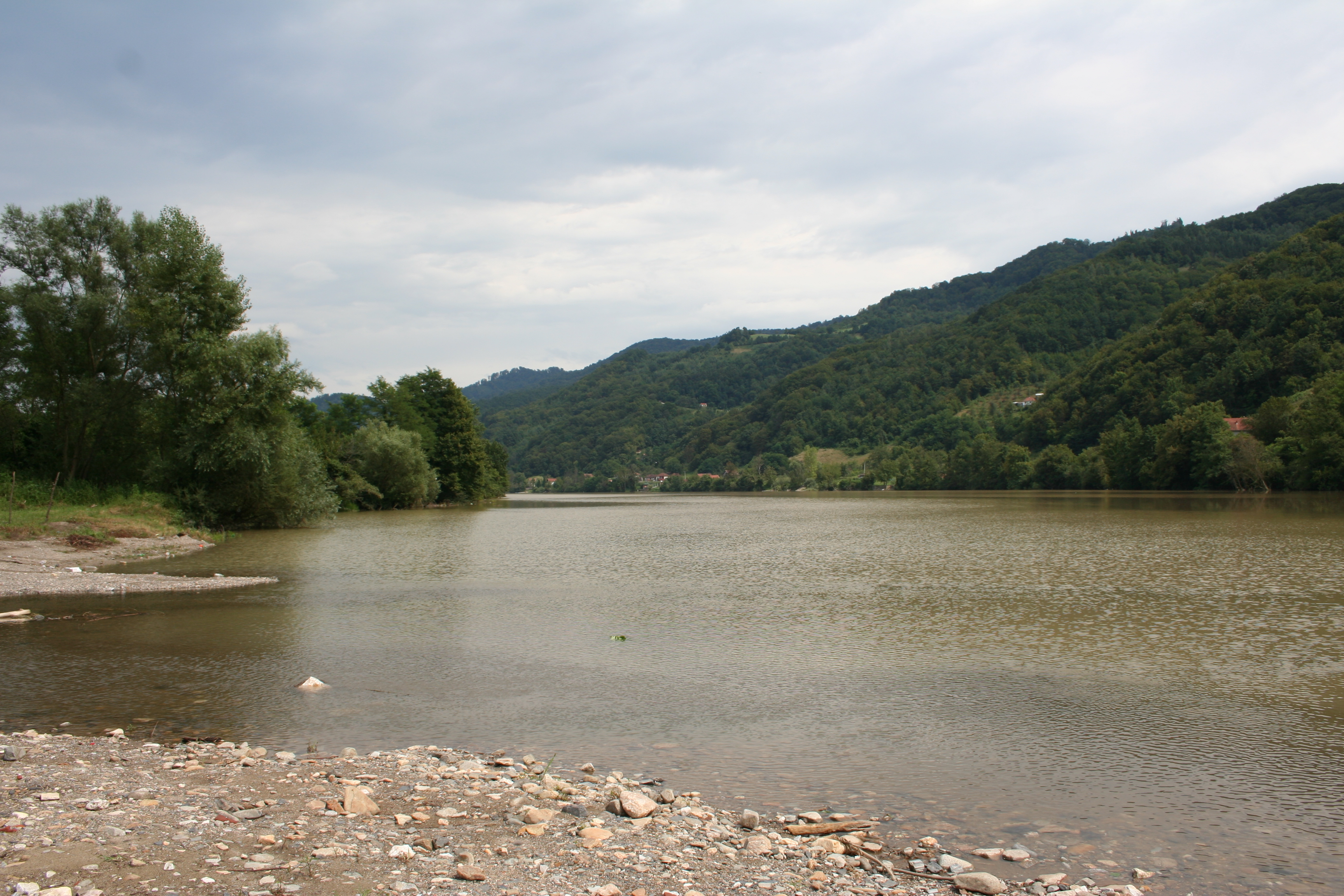 Zvorničko jezero na Drini, Voljevci